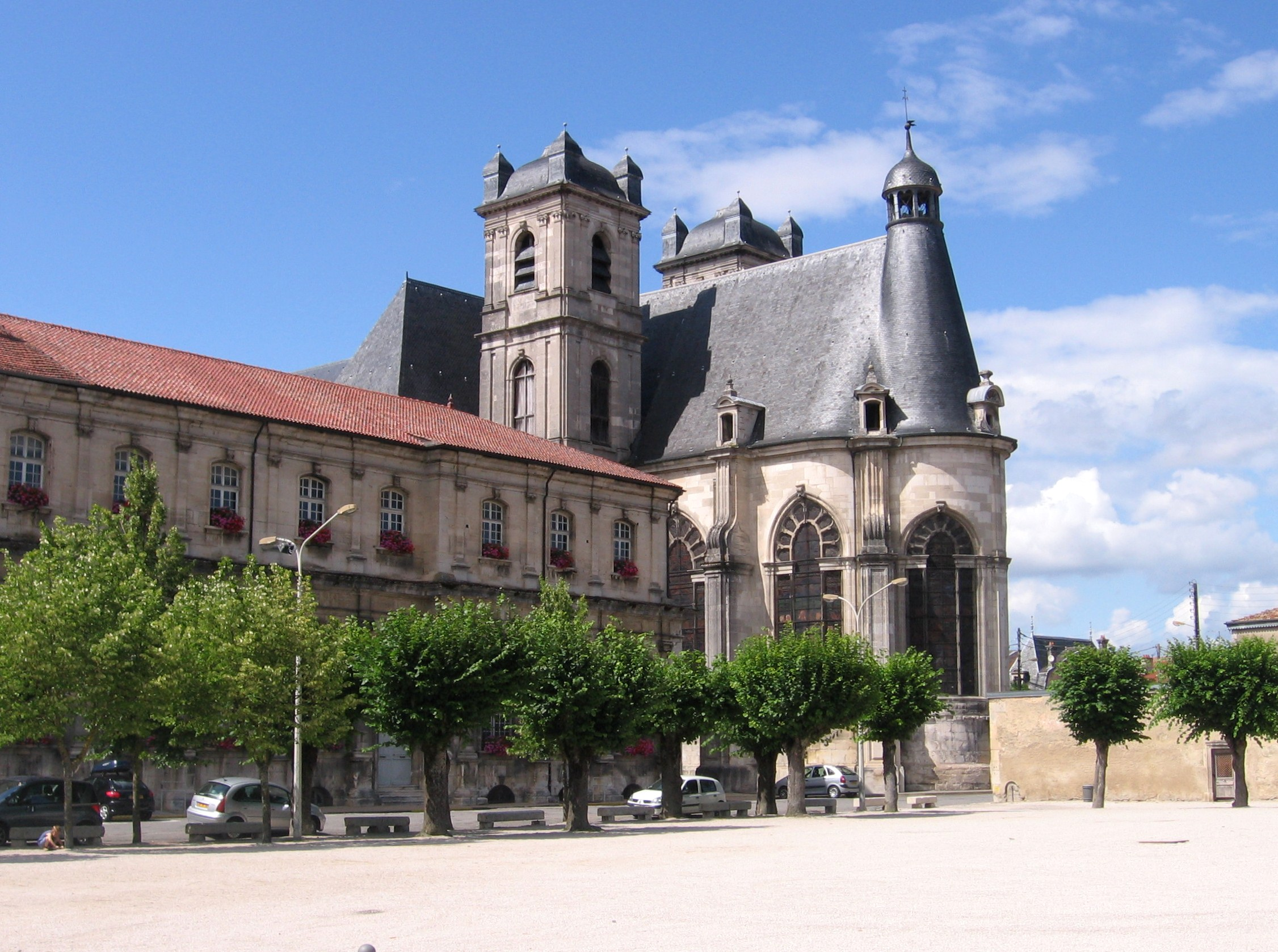 ancienne abbaye vue depuis la palce des minimes et avec la mairie. This building is en partie classé, en partie inscrit au titre des Monuments Historiques. .